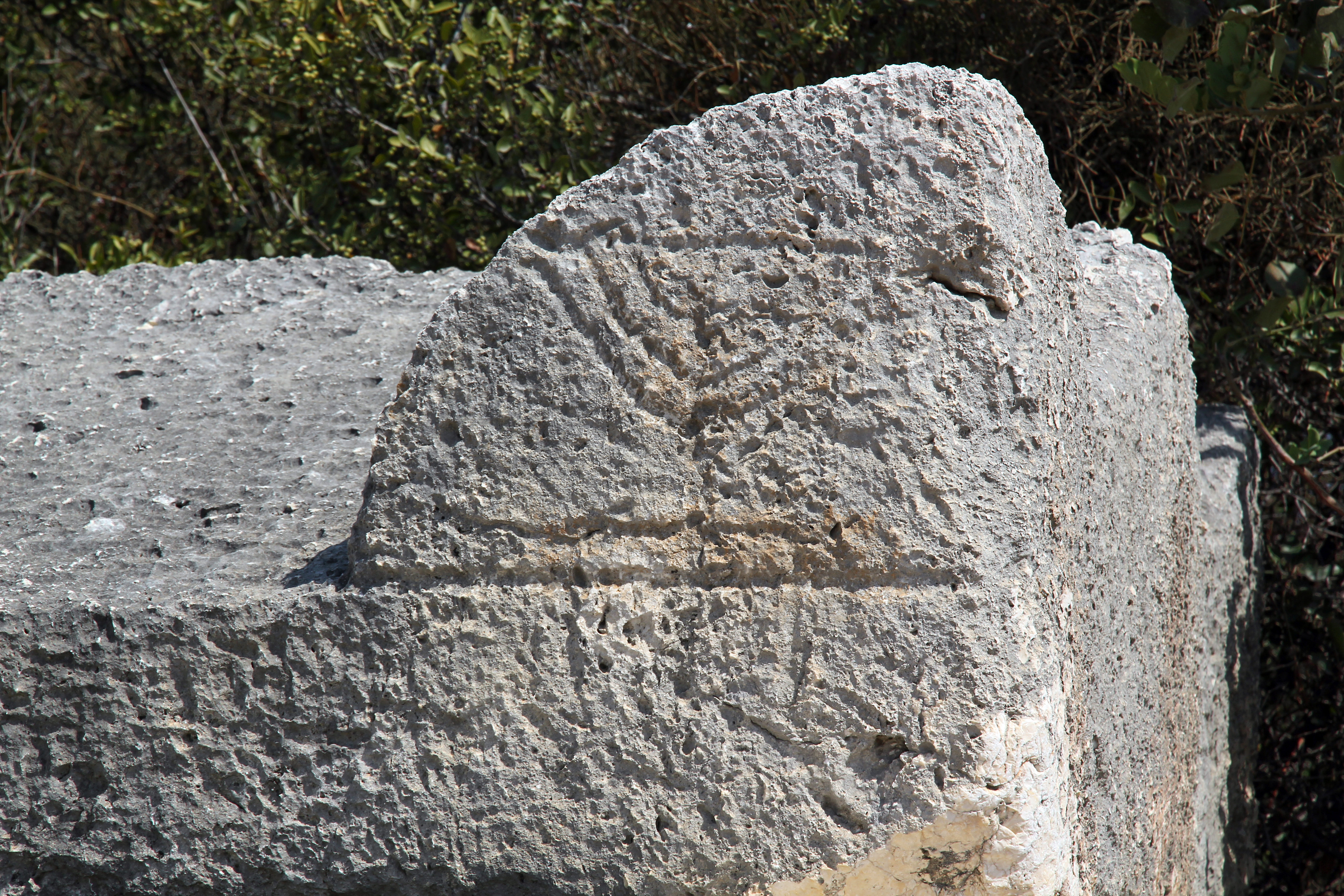 Korykos, archäologischer Fundort in der Südtürkei, Menora auf einem Sarkophagdeckel in Nekropole III